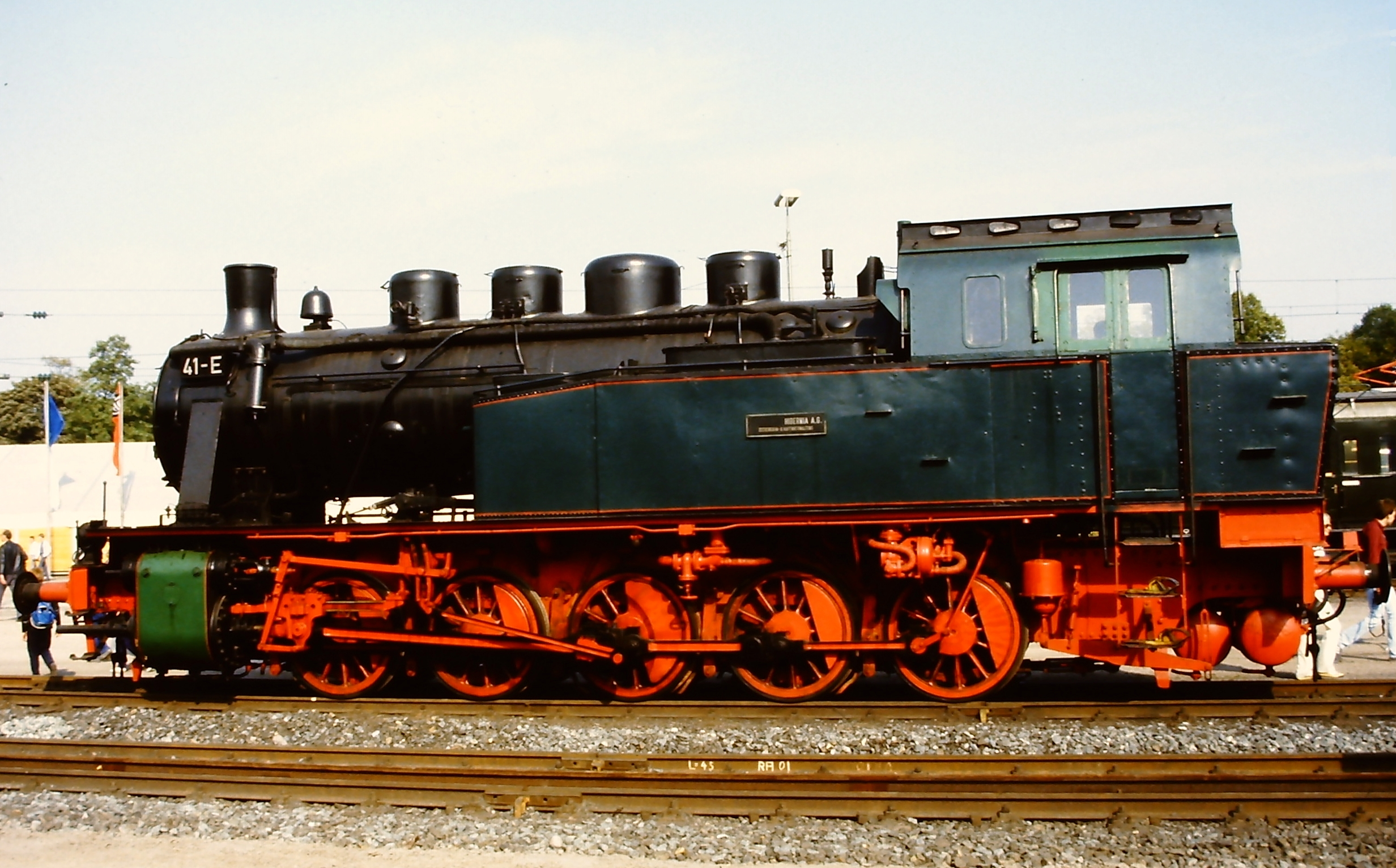 Dampflokomotive Hibernia 41-E, ausgestellt auf der Fahrzeugschau 150 Jahre deutsche Eisenbahn in Bochum-Dahlhausen.